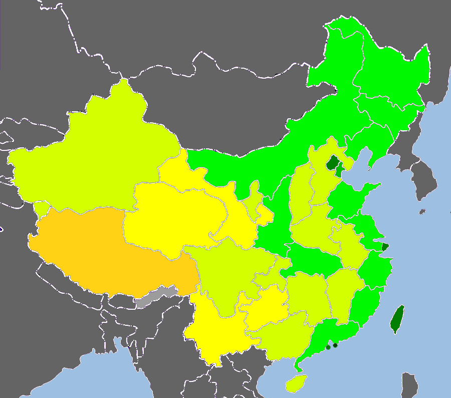 中國各省人類發展指數分層圖